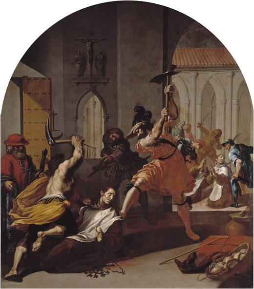 El martirio de los cartujos de Roermond.label QS:Les,"El martirio de los cartujos de Roermond."